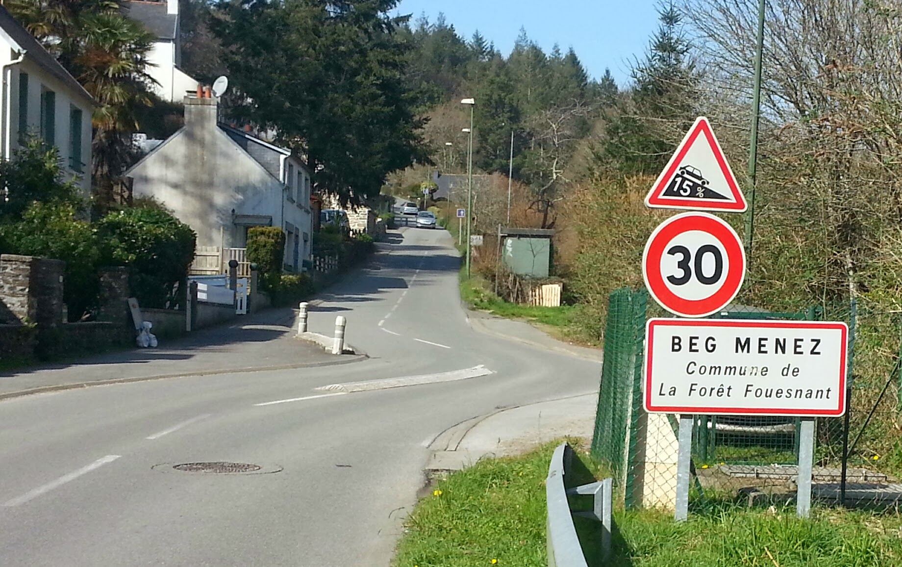 La côte de Beg Menez, réputée pour être une des plus dures du sud-Finistère.